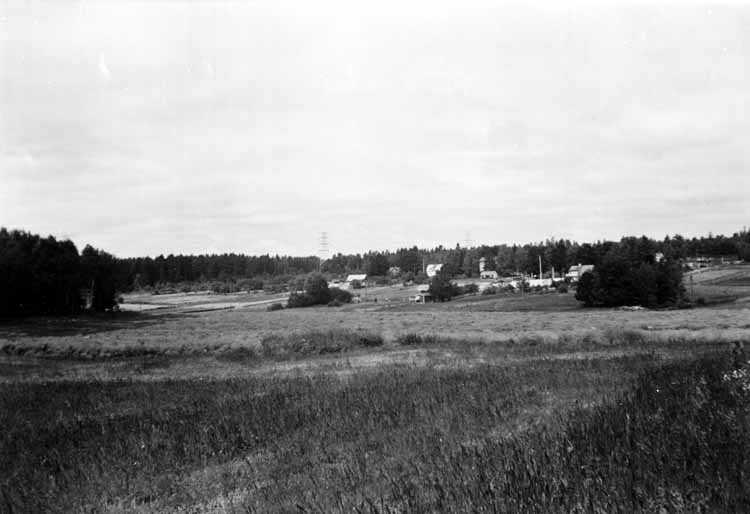 Vams gårds gamla gårdsplats nordväst om Viksjö gård, Järfälla kommun.